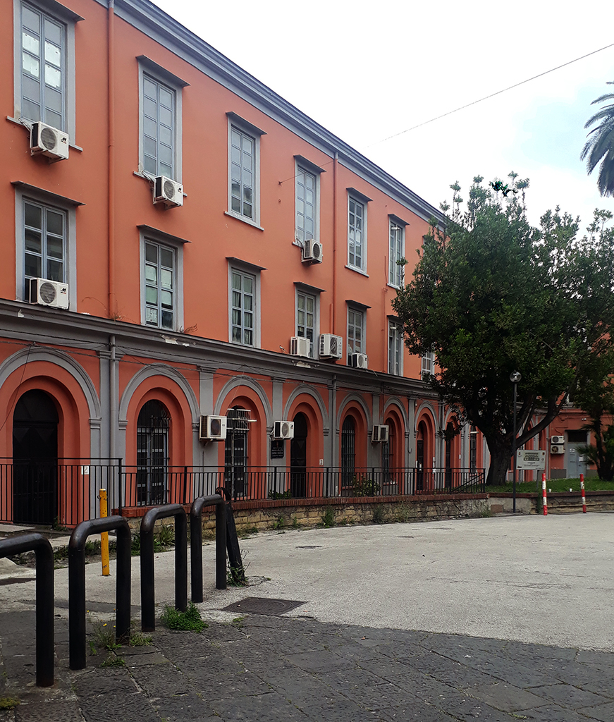 Napoli, l'ala restaurata dell'antica stazione Bayard della ferrovia Napoli-Portici, prima in Italia.